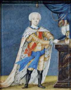 Неизвестный художник. Портрет великого князя Петра Федоровича. Конец 1730-х – начало 1740-х годов. Слоновая кость, акварель, гуашь